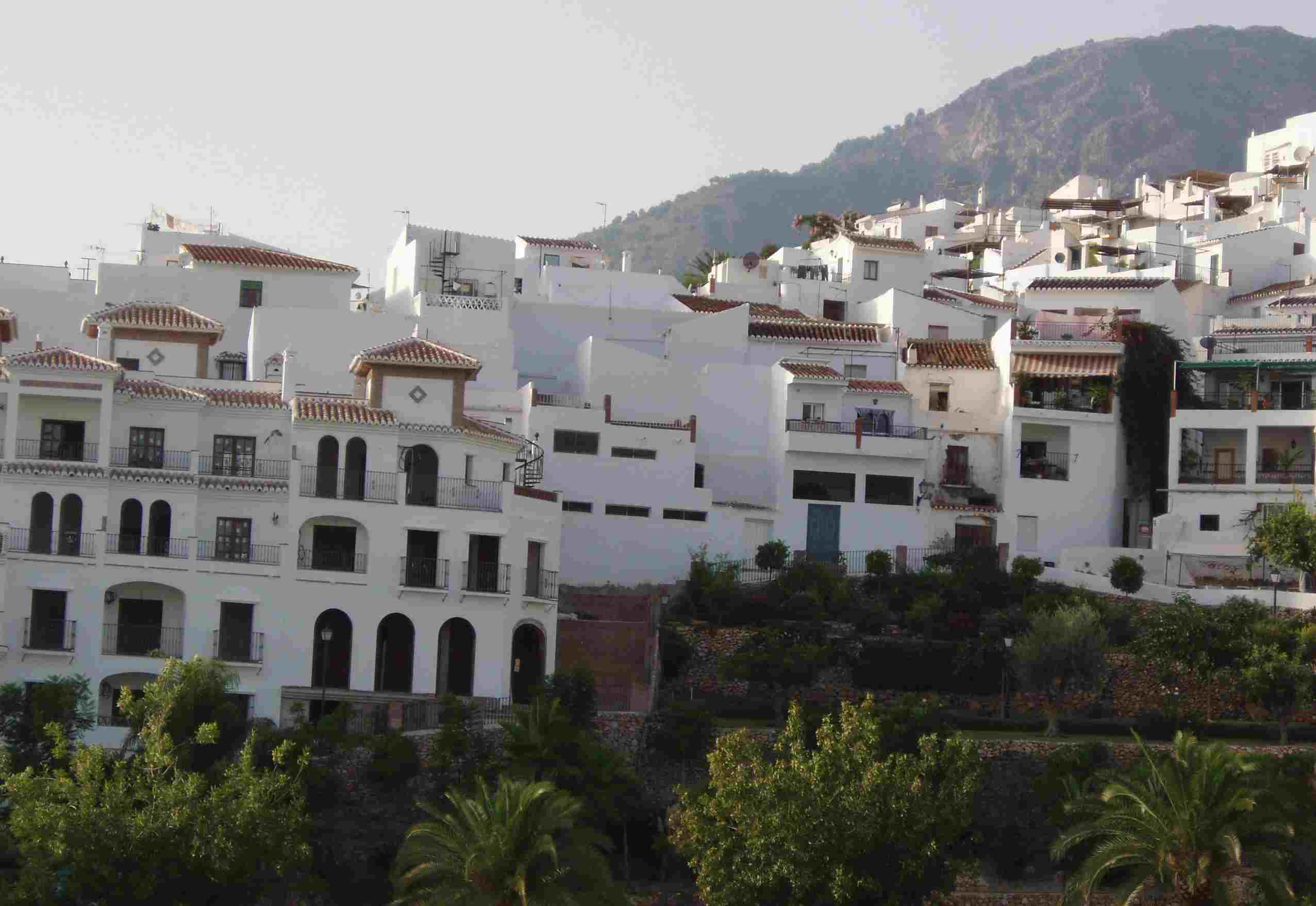 Impressions of Frigiliana (Málaga) in Andalucía, (España)